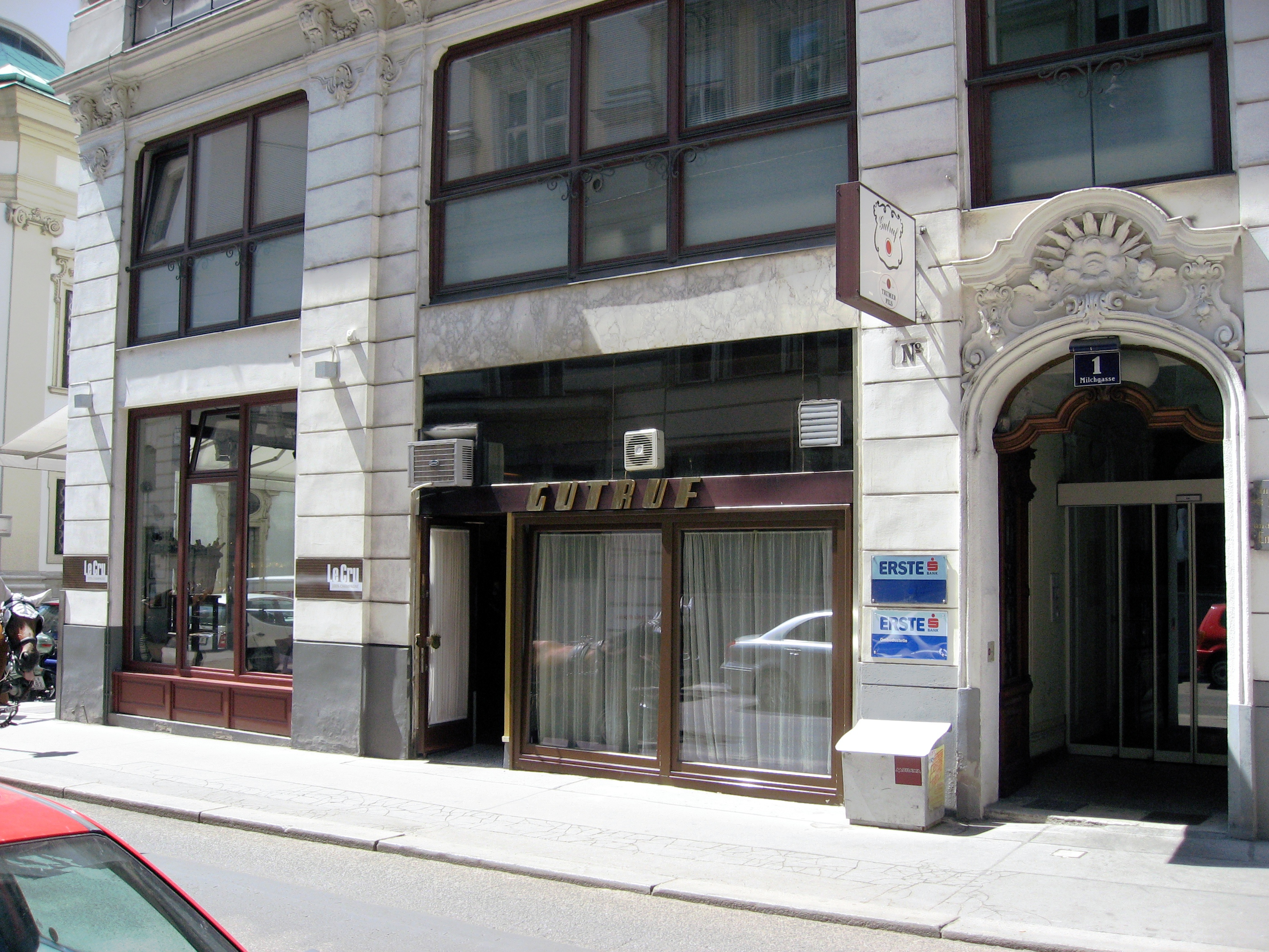 Wien, Gutruf